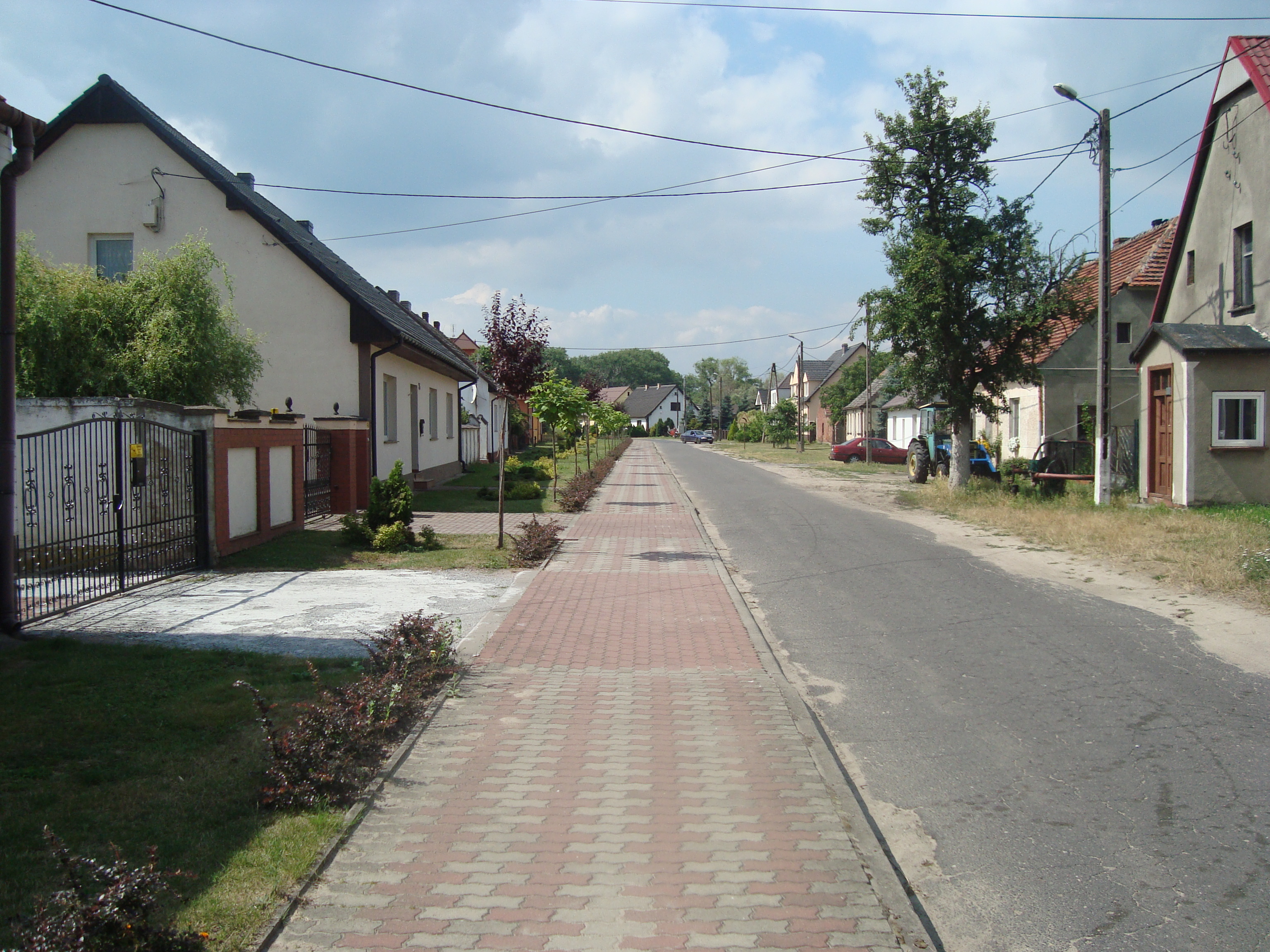 Zdjęcie przedstawia fotografię miejscowości Przyborów w powiecie sulęcińskim. Wiosna 2016